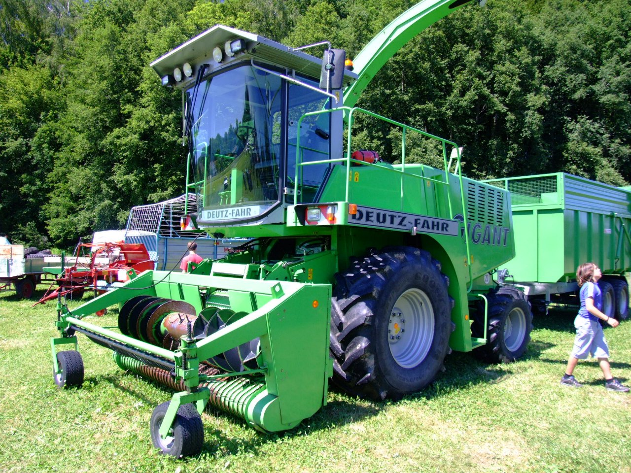 Deutz-Fahr-Feldhäcksler Gigant (400) 65-05, Baujahr 1998